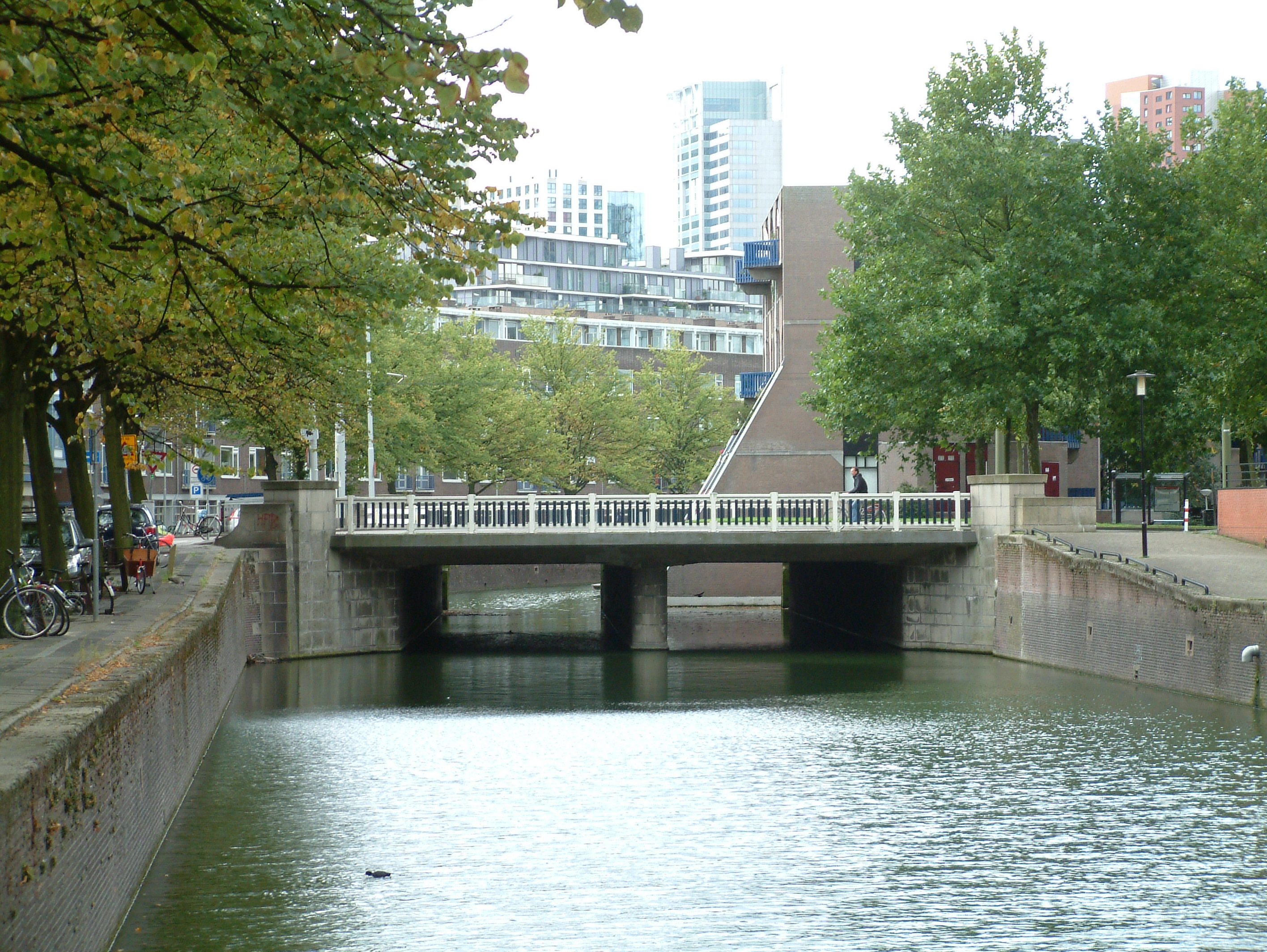 Bruggen over de Rotte, De Karnemelksbrug in de Goudsesingel, oostkant